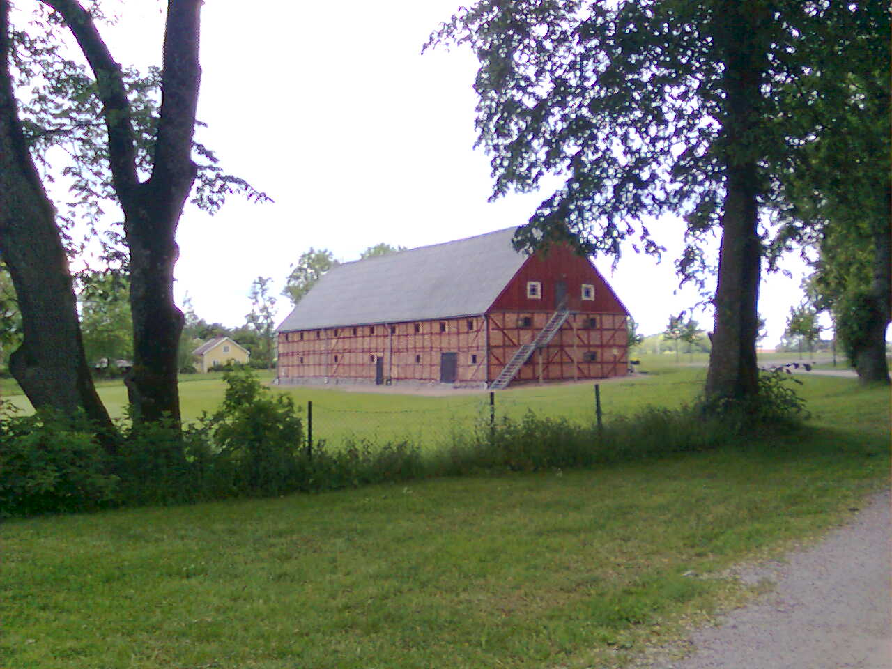 Magasinsbyggnad vid Vapnö slott.